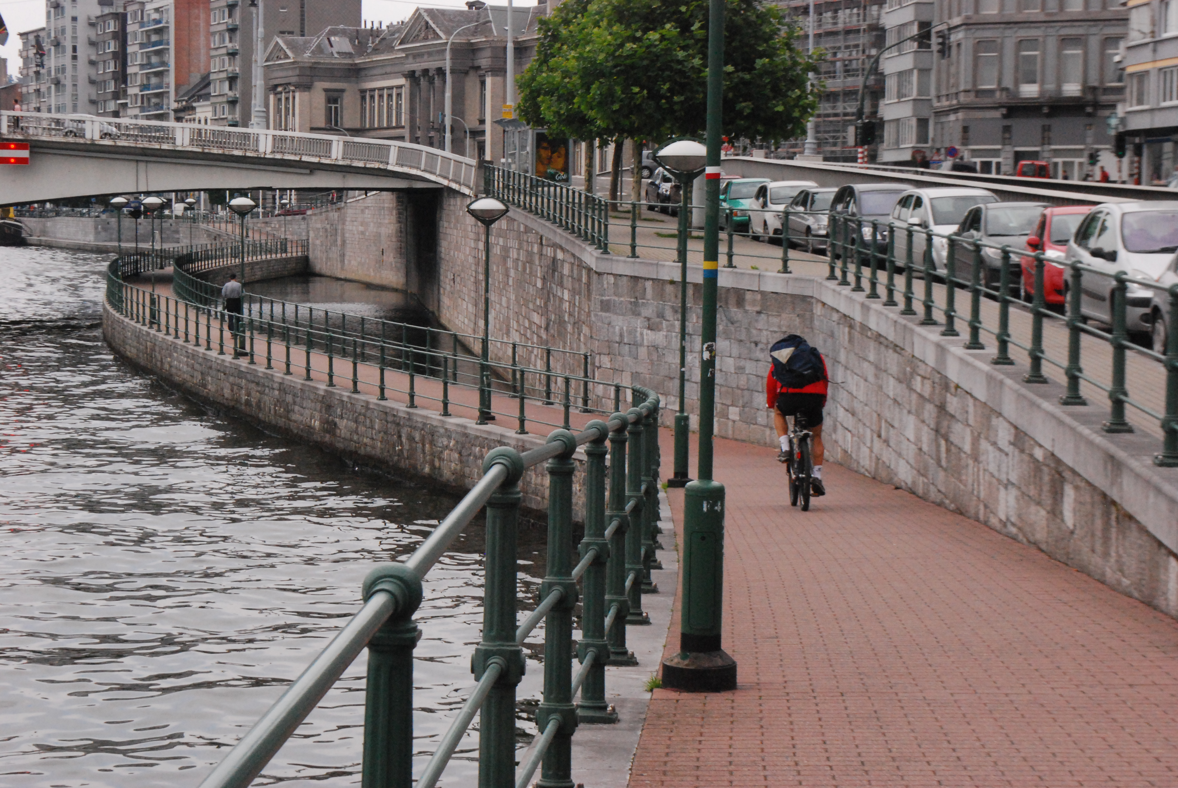 La piste cyclable en bord de Meuse, sur le quai Churchill à Liège.